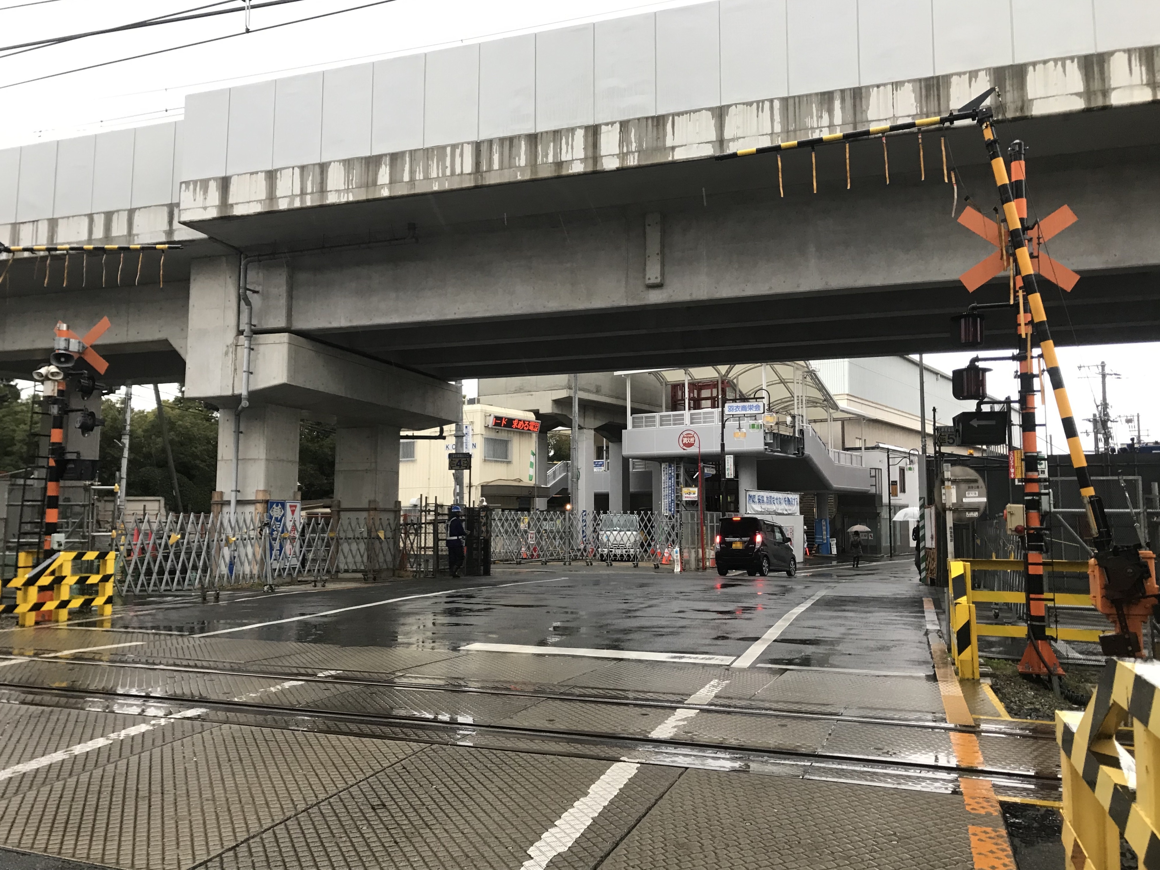 東羽衣駅の駅舎と高架化工事中の南海本線